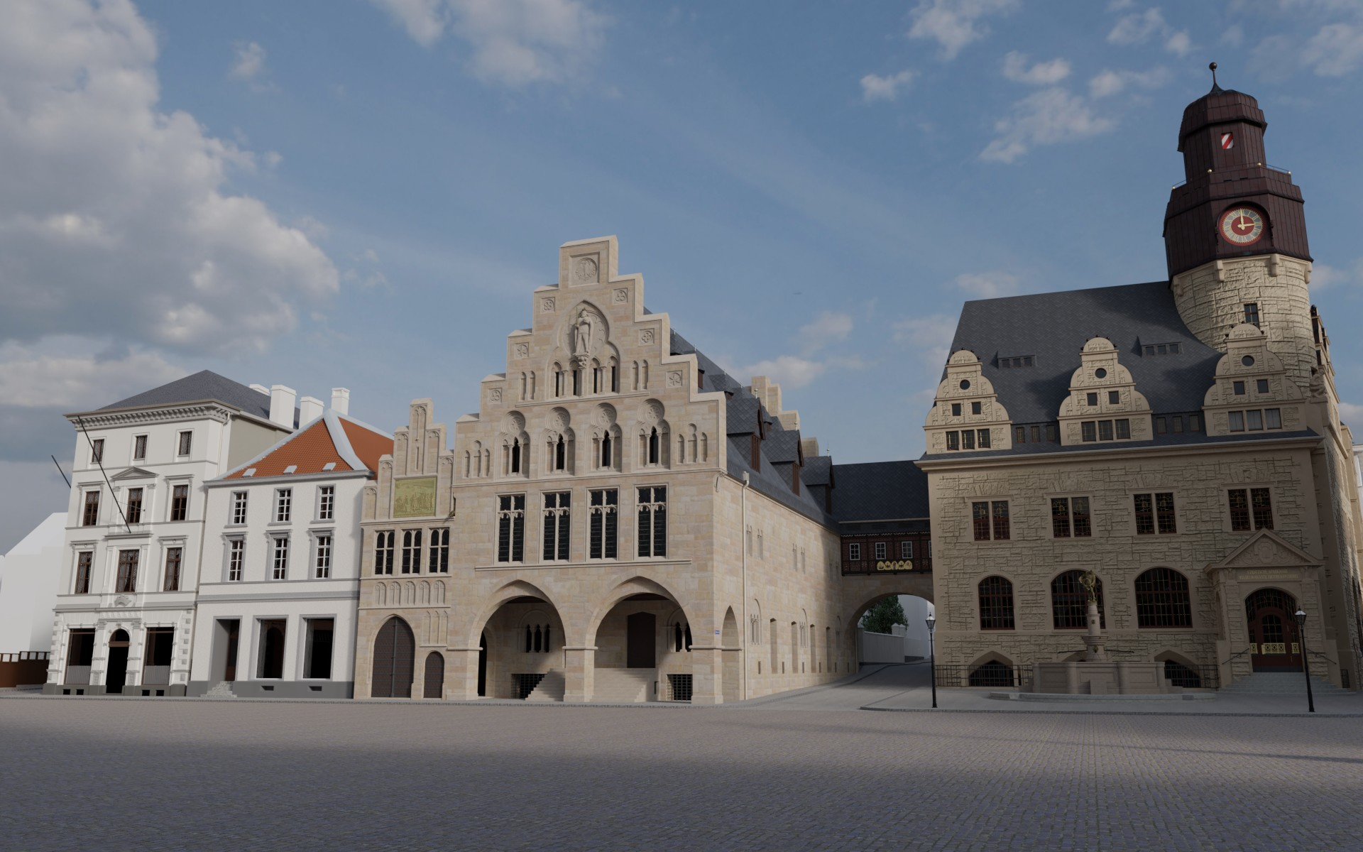 Blick auf die Südseite des Alten Markts in Dortmund von der Ecke 2. Marktstraße/Salzgasse aus. Die virtuelle Rekonstruktion zeigt den Zustand im Jahre 1909. Von Links nach Rechts zu sehen sind die Krone am Markt, das Haus zum Spiegel, das alte Rathaus und die Sparkasse/Bibliothek. Zwischen Rathaus und Sparkasse mündet die Balkenstraße in den Markt. Heute befindet sich an der Stelle von Krone, Spiegel und Rathaus der Kronenkomplex.